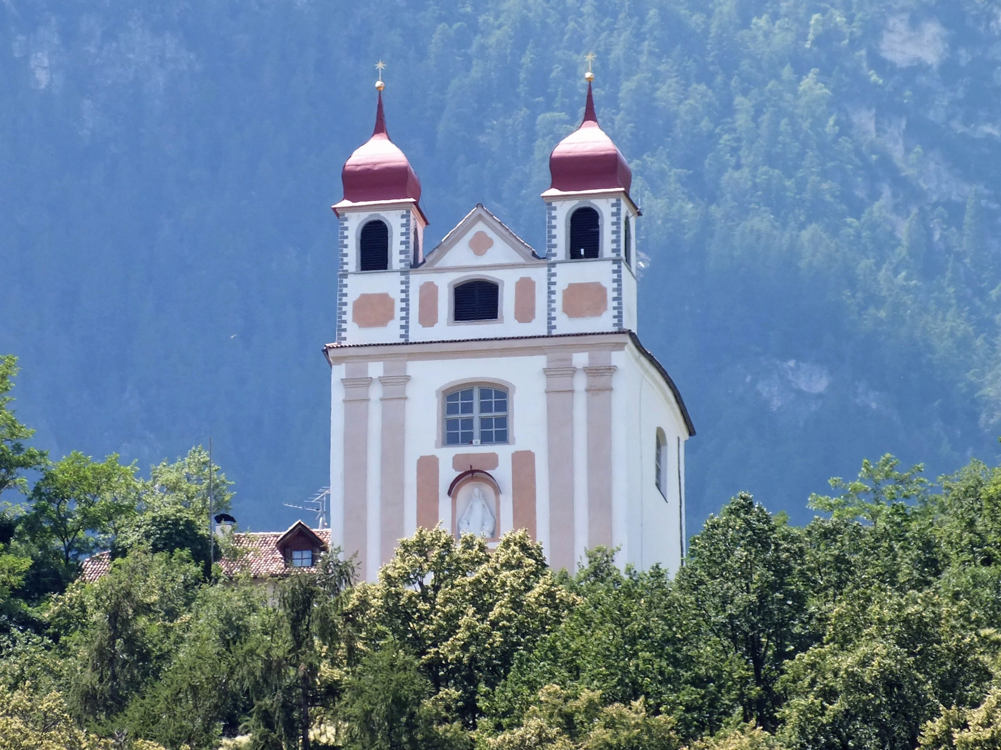 Die Gleifkirche in Eppan. Südtirol